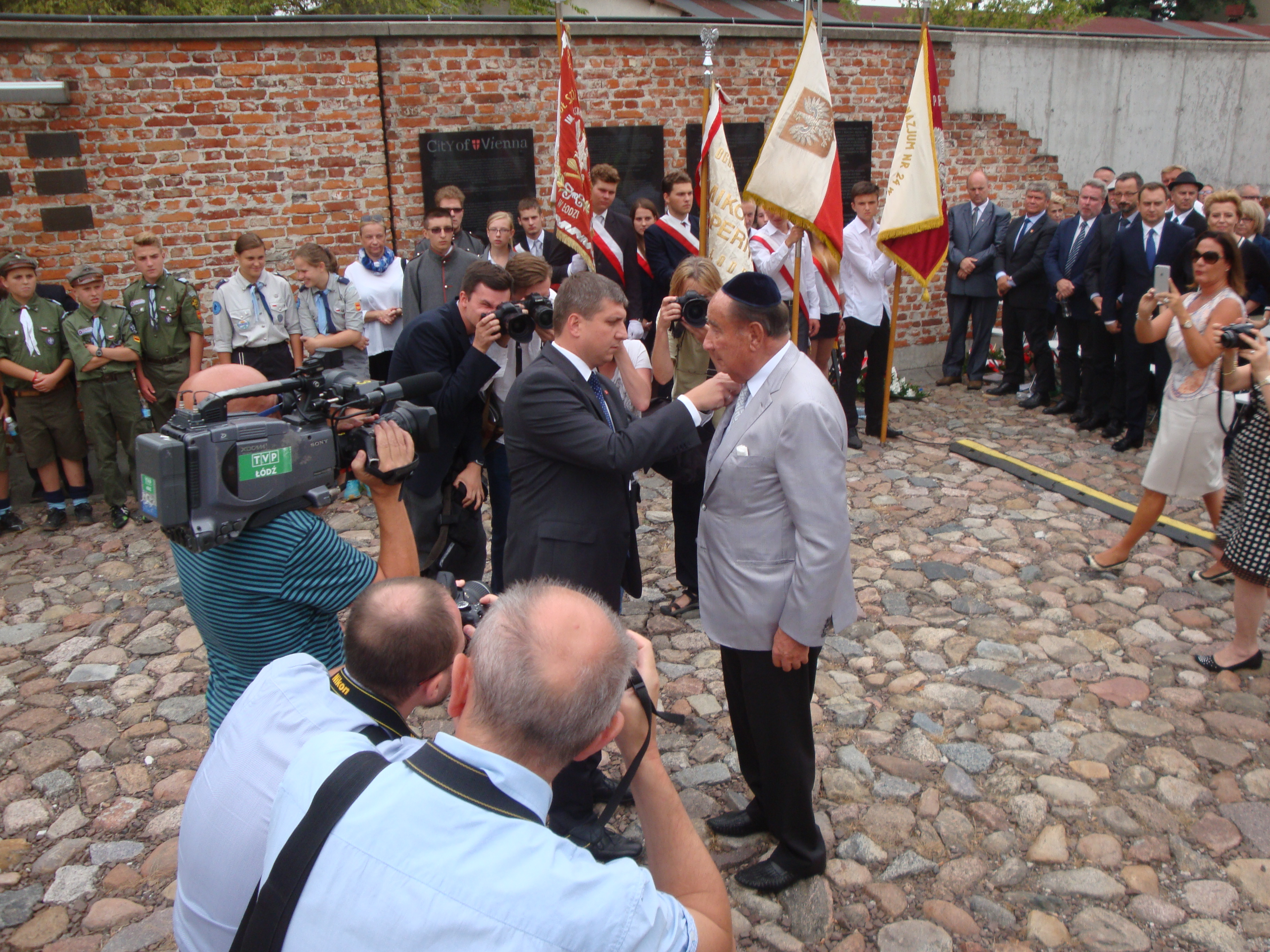 Łódź 71. rocznica likwidacji Litzmannstadt Getto, Josef Buchmann honorowany Odznaką Za Zasługi dla Miasta Łodzi